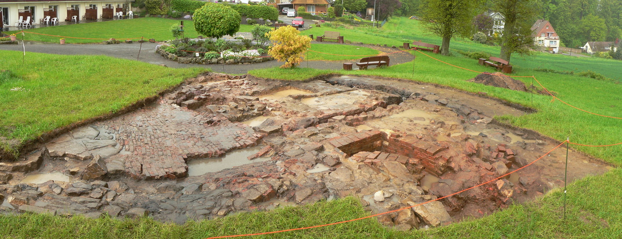 Panorama der Grabung im Bereich der Glashütte Klein Süntel